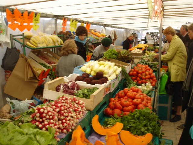 Arcades Marché-Neuf, Saint-Germain.